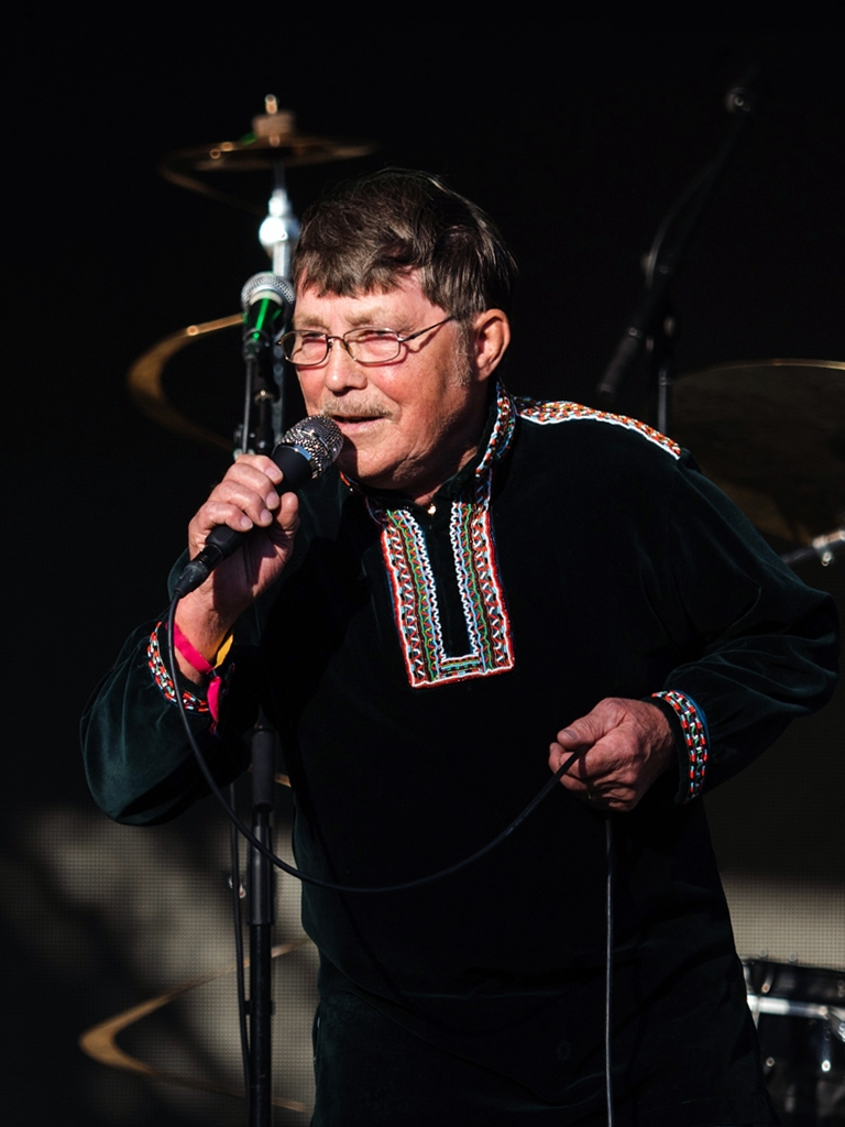 Åpning av Riddu Riđđu 2018 av Trine Skei Grande og fremføring av bestillingsverket Leu'dd. Foto: Daniel Skog